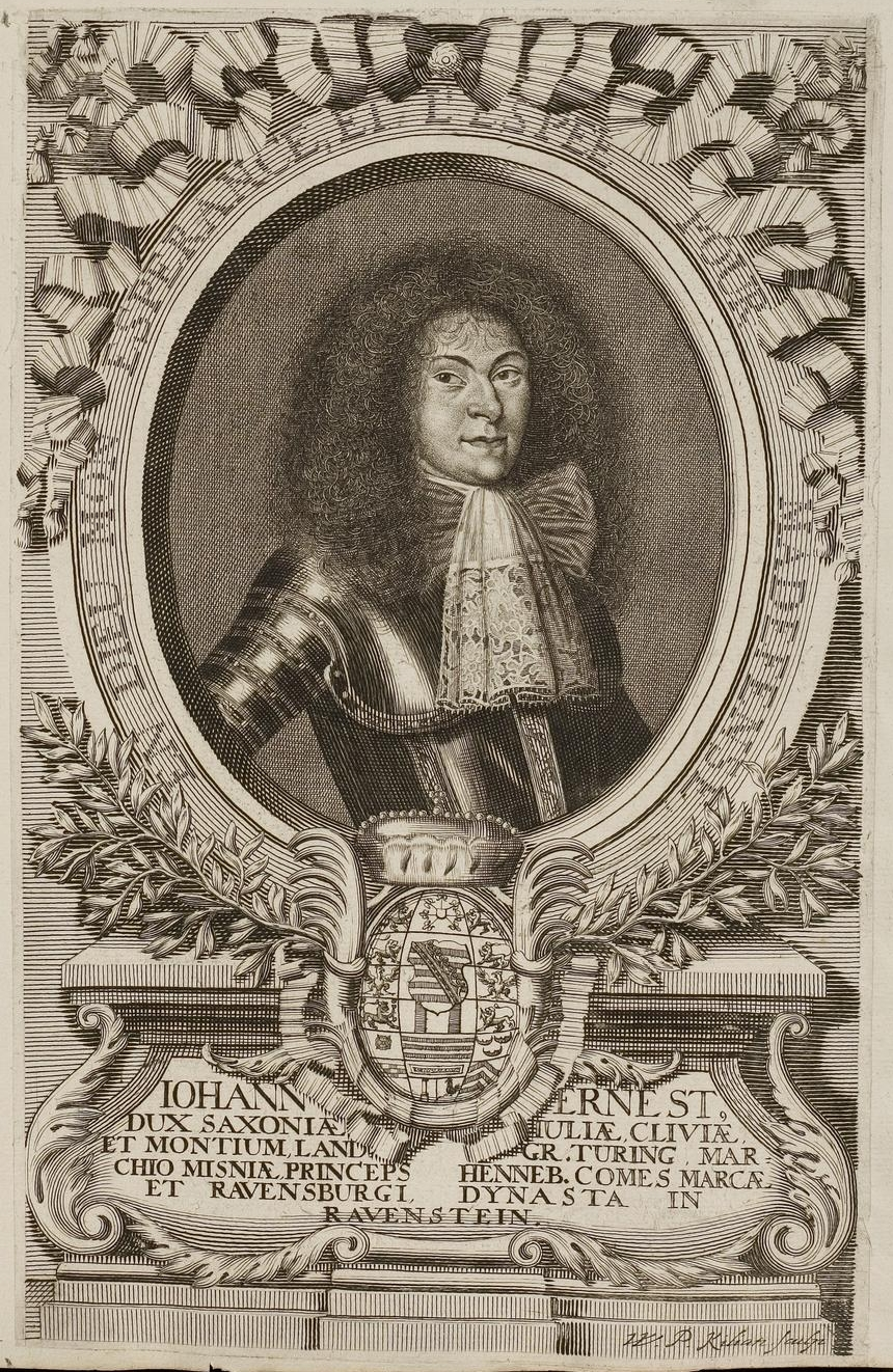 Grafik aus dem Klebeband Nr. 1 der Fürstlich Waldeckschen Hofbibliothek Arolsen Motiv: Herzog Johann Ernst von Sachsen-Saalfeld